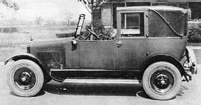 New for 1922 Elcar L4 taxicab bodied as town landaulet with closed top over passenger compartment